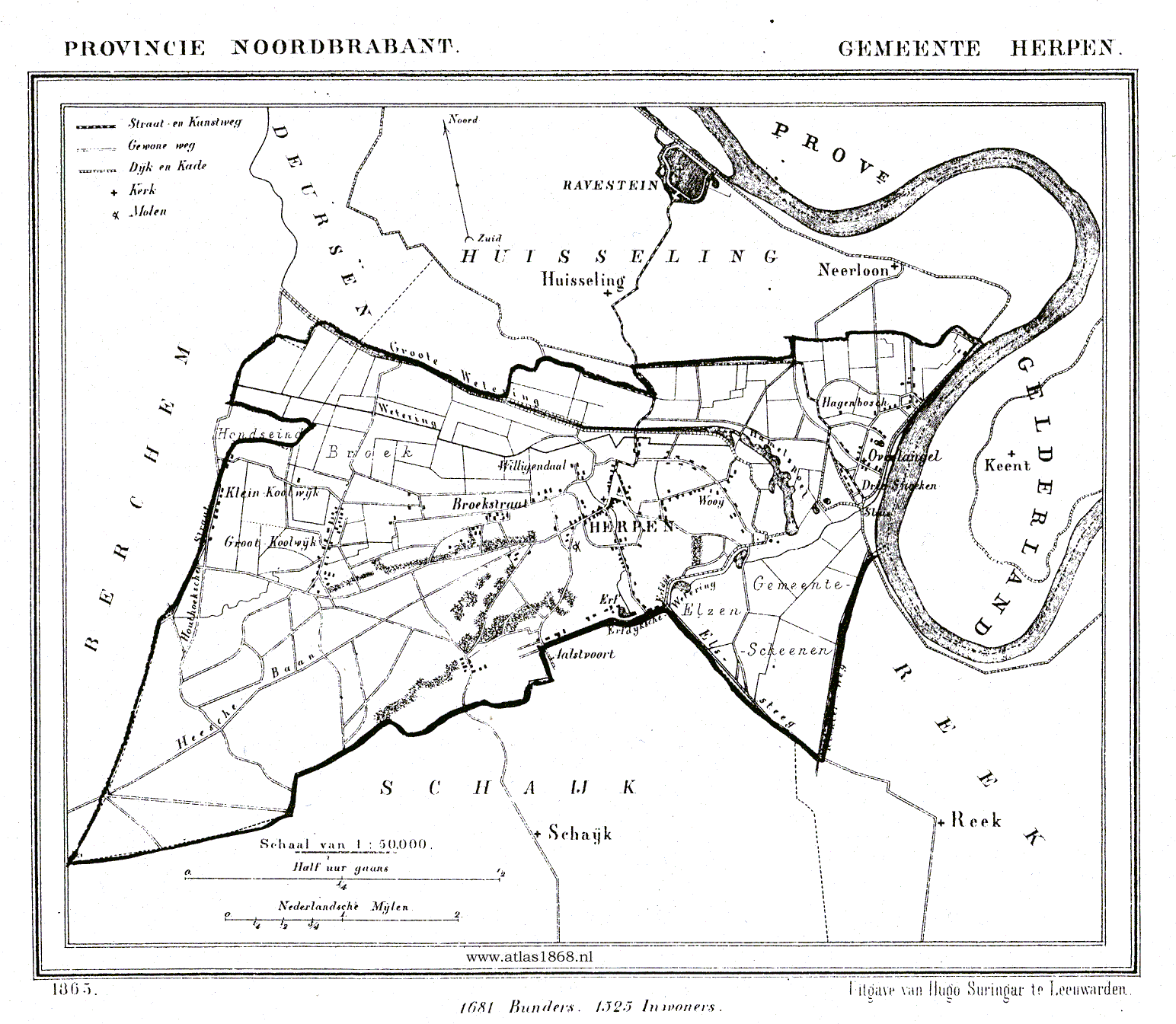 Nederland, Noord-Brabant, Gemeente Herpen